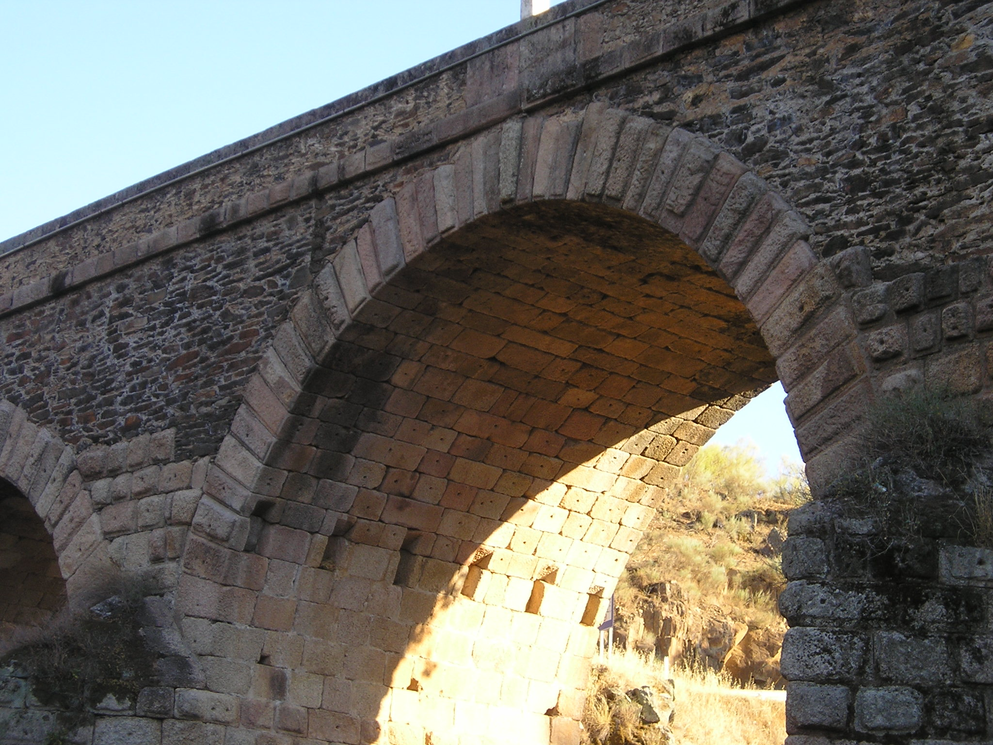 Detalle de uno de los arcos menores originales del puente romano sobre el río Erjas, en la frontera entre Portugal y España entre la provincia de Cáceres y el distrito de Castelo Branco, construido bajo Trajano. Conocido también por Puente de Segura.